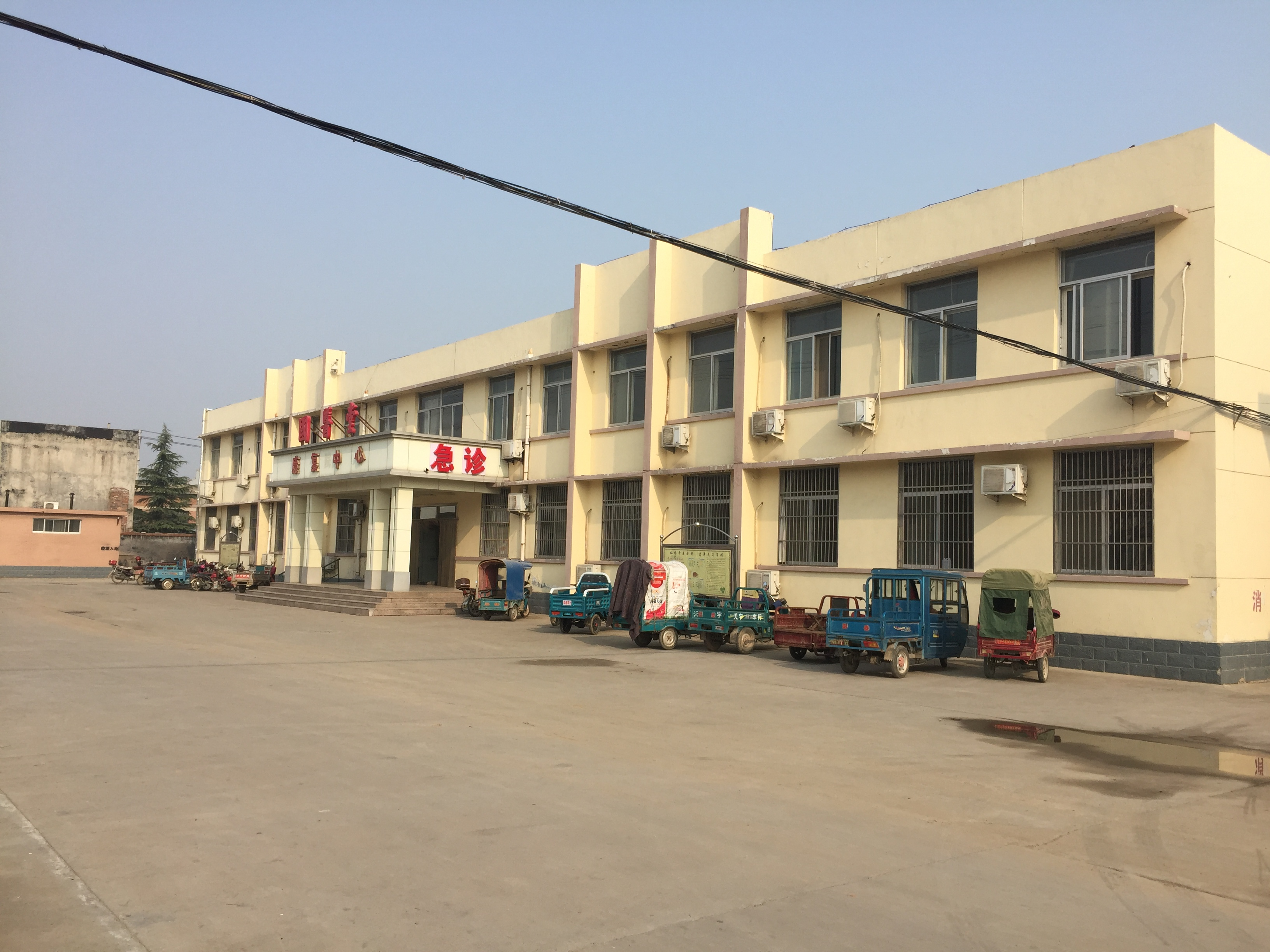 中文（中国大陆）: 肥城市桃园镇国医堂